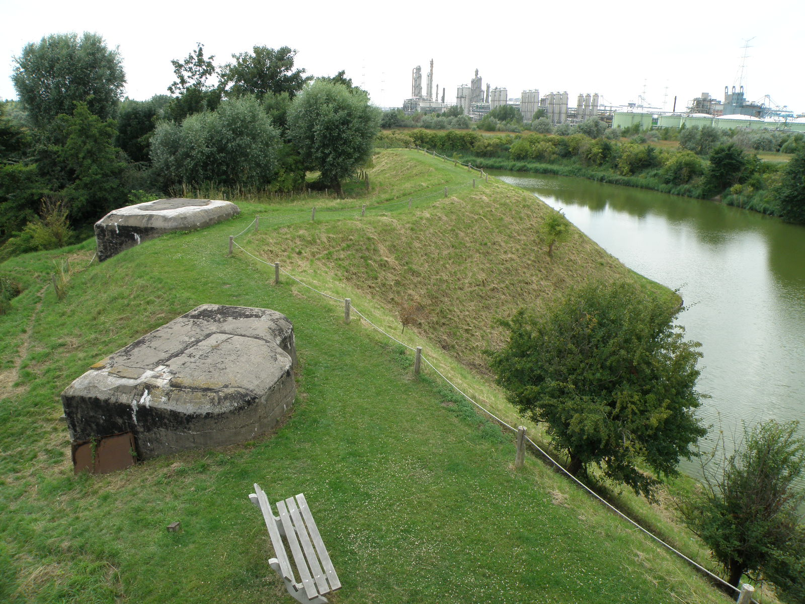 Fort de Liefkenshoek, situé sur la rive gauche de l'Escaut à 12km (à vol d'oiseau) au nord-ouest d'Anvers, dans la commune de Beveren (section de Kallo), Belgique. Vue sur les remparts, les deux bunkers allemands de 1917 et la pétrochimie environnante depuis le sommet du belvédère (coup d'oeil vers le sud).